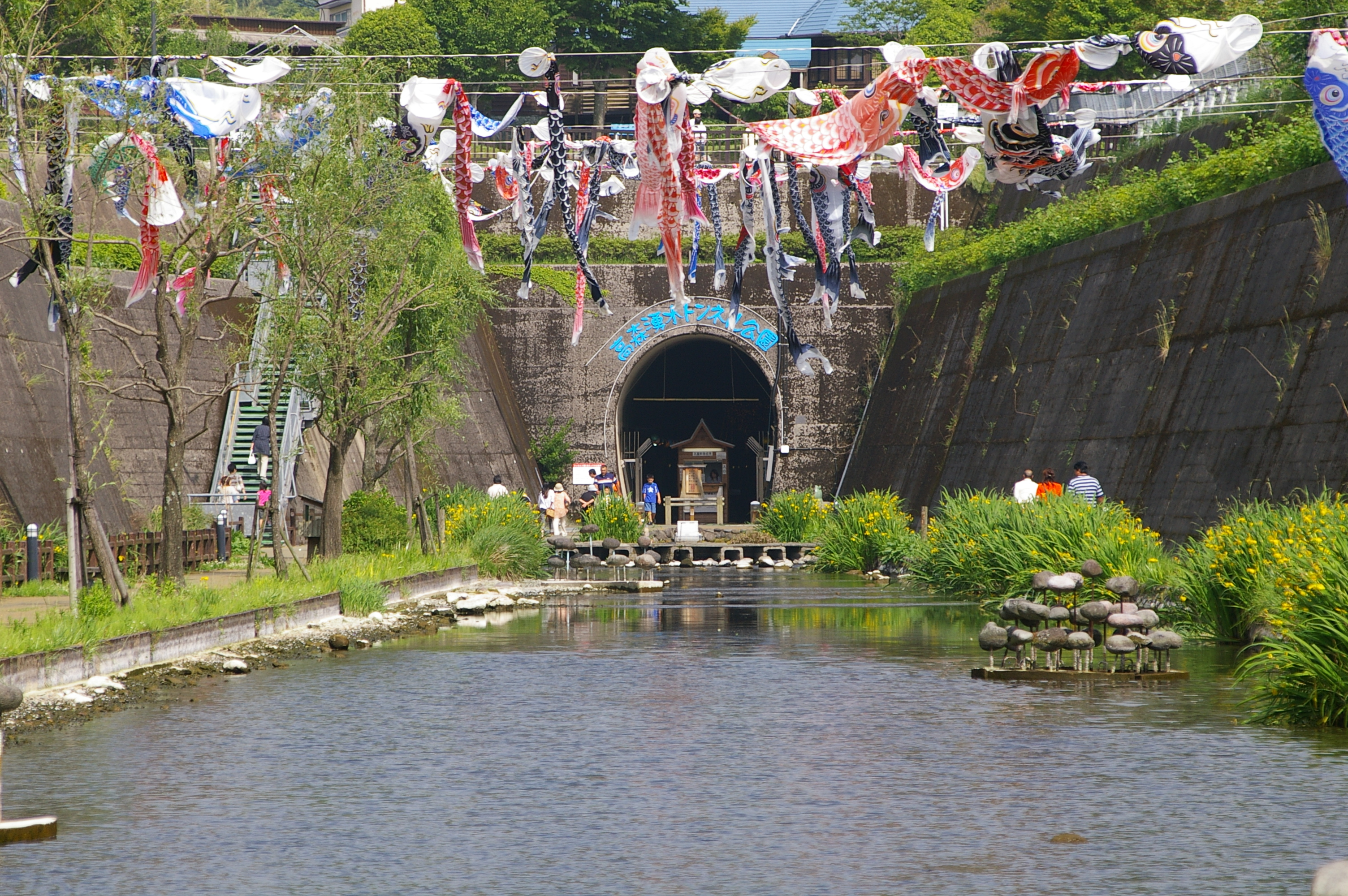 Takamori Spring Tunnel Park at Takamori Town, Kumamoto Pref., Japan